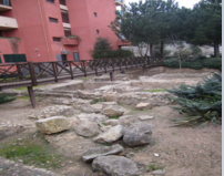 Les termes de la Vil·la de la Burguera.